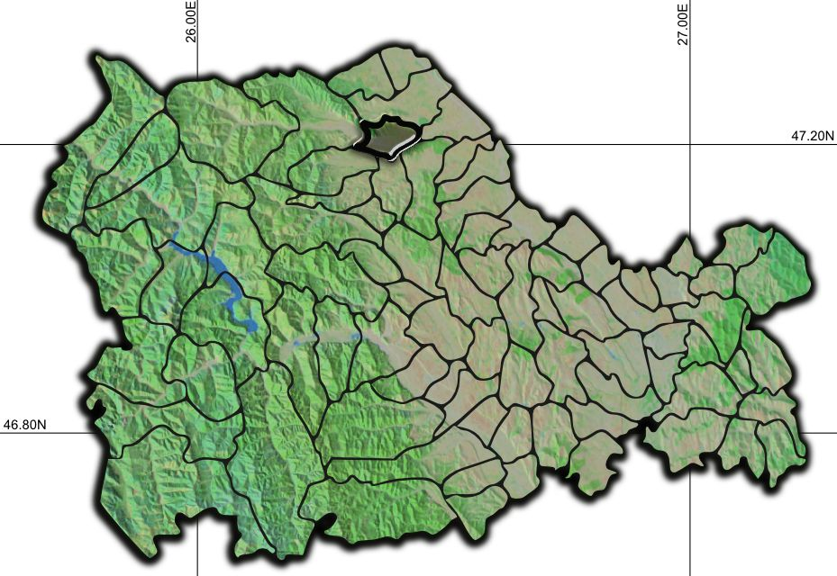 Targu Neamt jud Neamt.